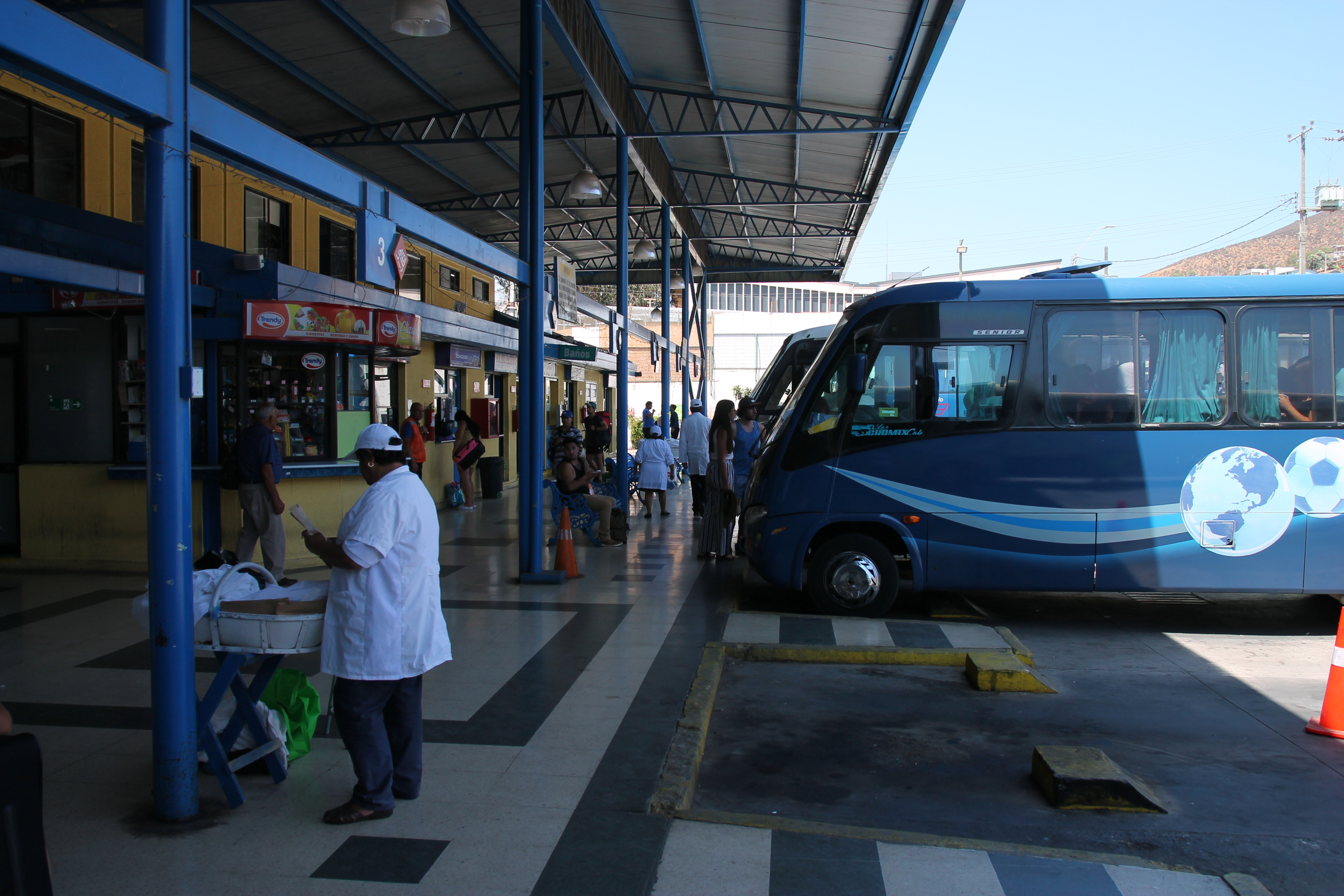 Autobusový terminál v La Lize, VP, Chile (2019)